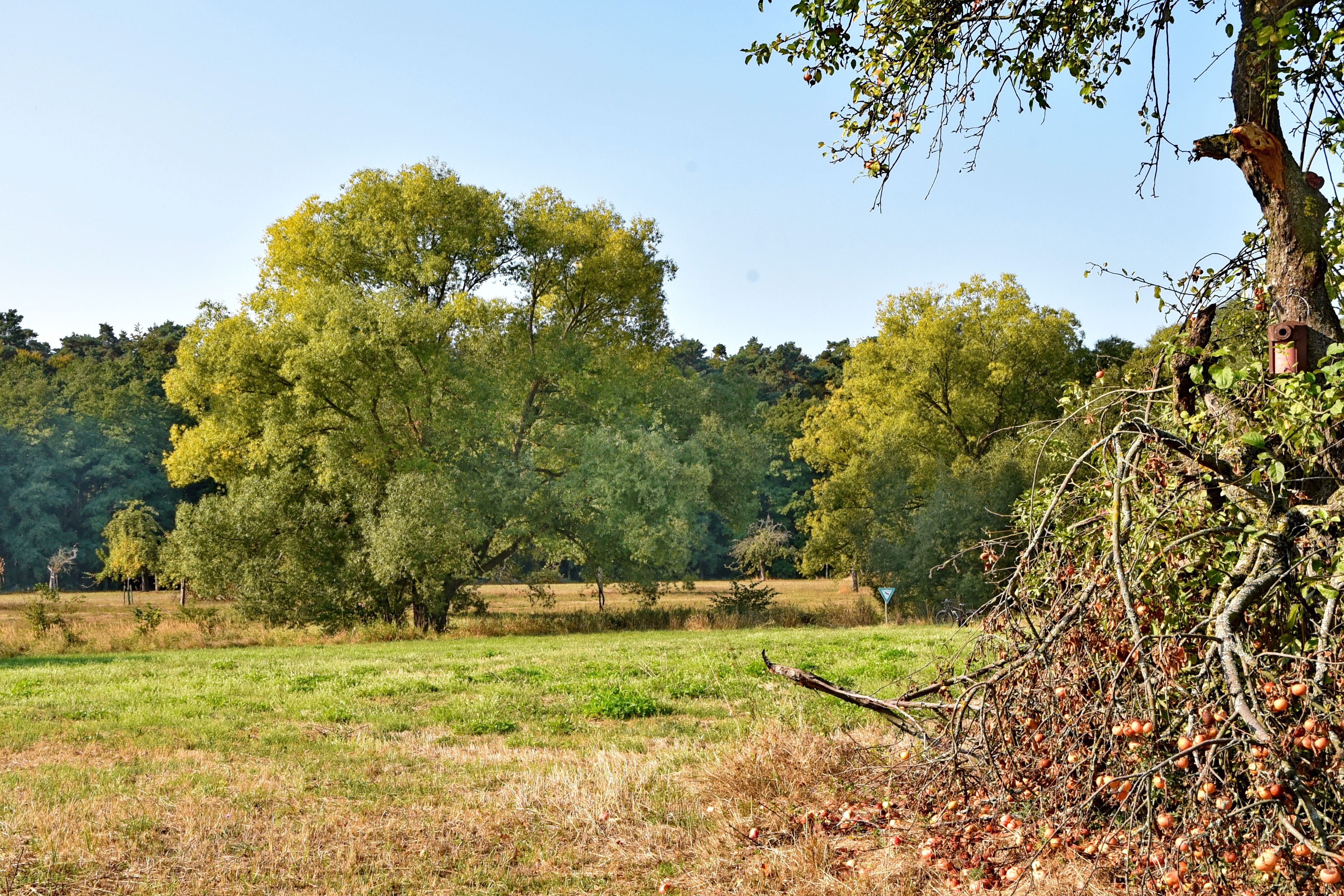 Das Naturschutzgebiet Im Woog von Hainstadt (NSG-Kennung 1438019) liegt im hessischen Landkreis Offenbach.